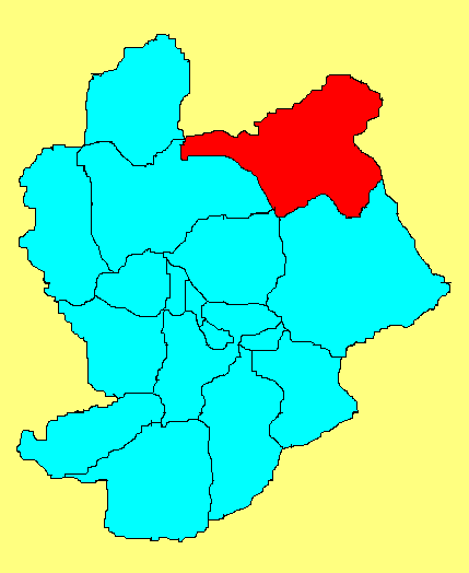 沽源县在张家口市的位置；此图片由王云峰wangyunfeng原创，用于WIKI。